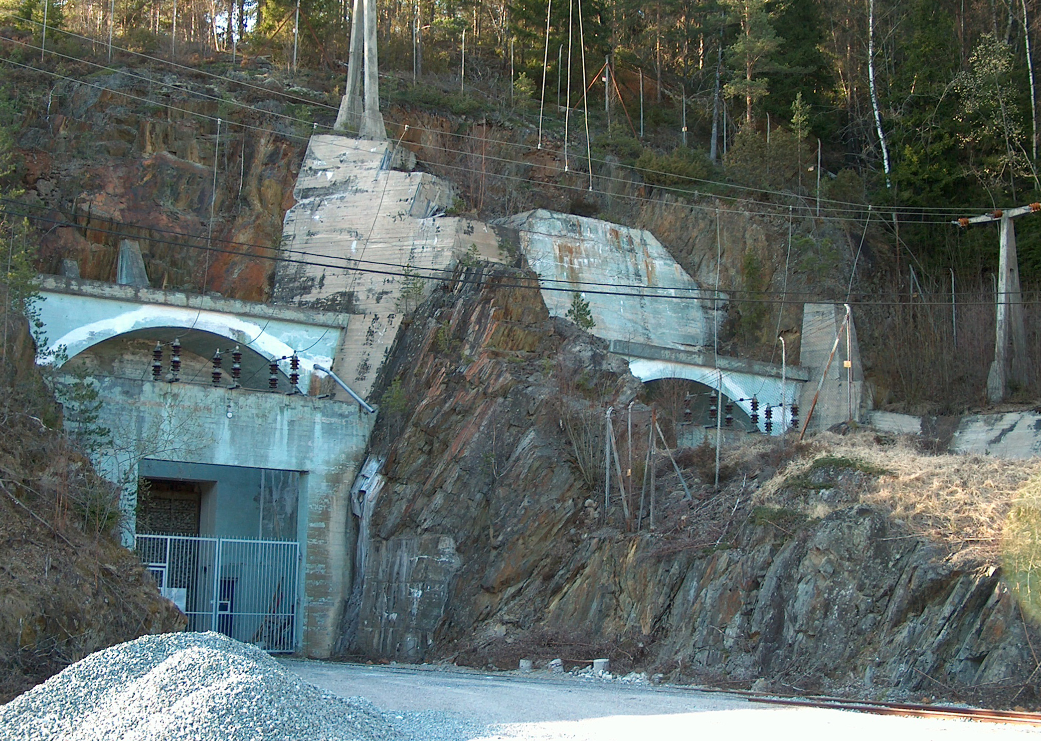 Nøkleby omformerstasjon (NSB) i Ytre Soknedalen